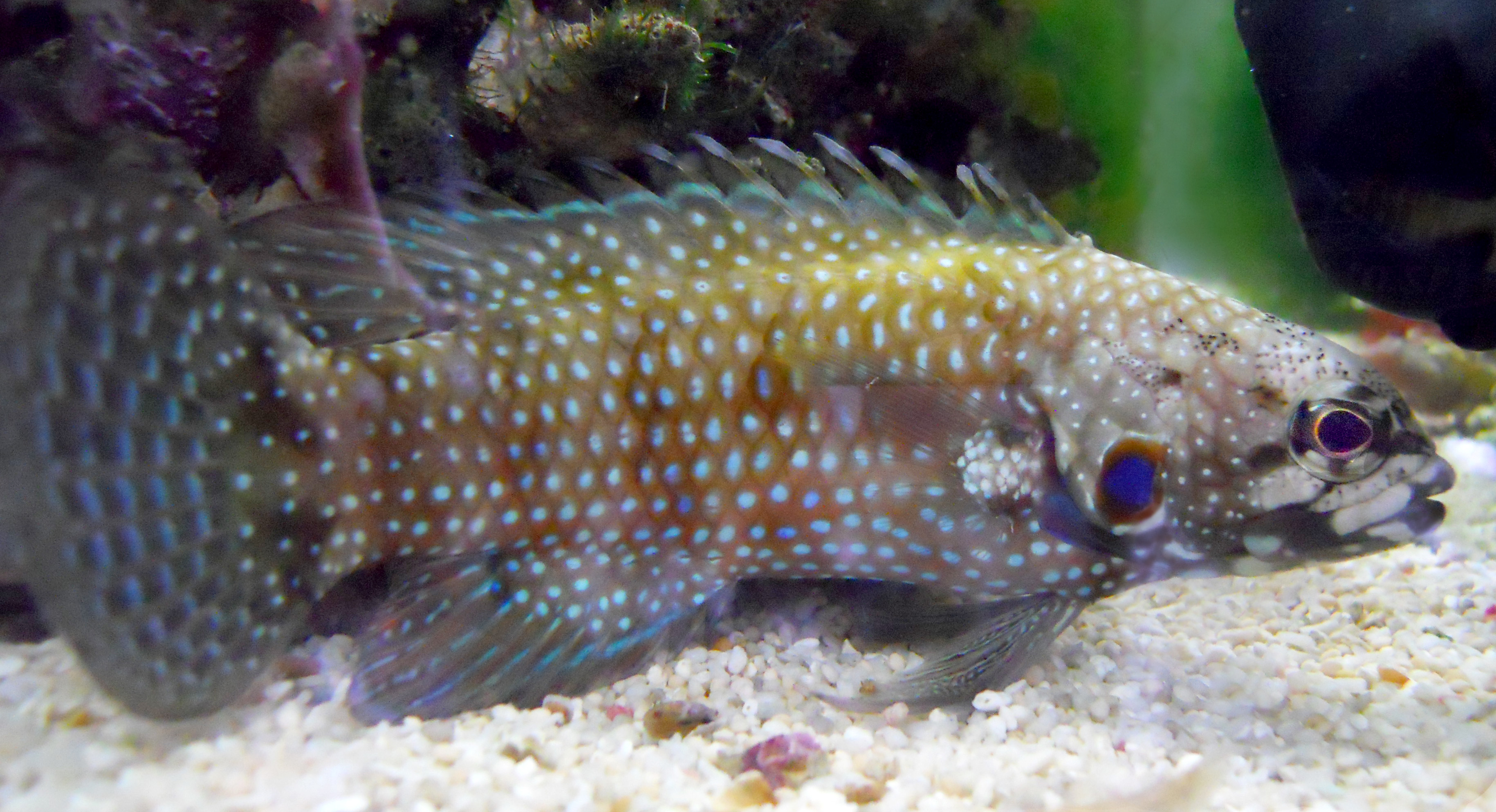 Blaukiemen Mirakelbarsch. Fisch in Aquarium.